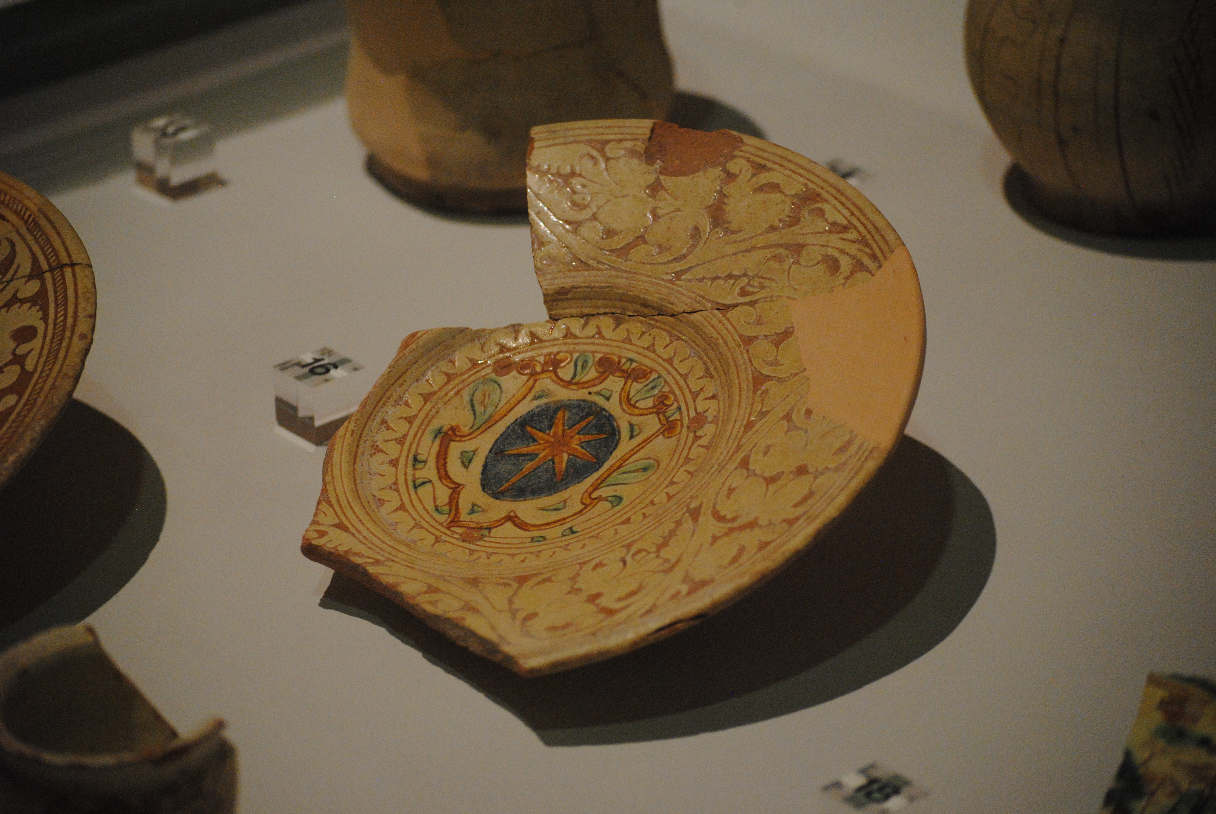 Scodella ingobbiata e graffita a fondo ribassato, risalente al 1560 - 1590 (rinvenuta durante gli scavi di via Sant'Apollonia, Pisa) - Museo nazionale di San Matteo.